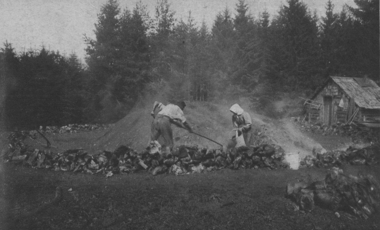 Beim 'Ausziehen 'Stören'. Die Kohlen werden mit sog. Störhacken herauszogen und etwa noch glühende Stücke mit Wasser gelöscht